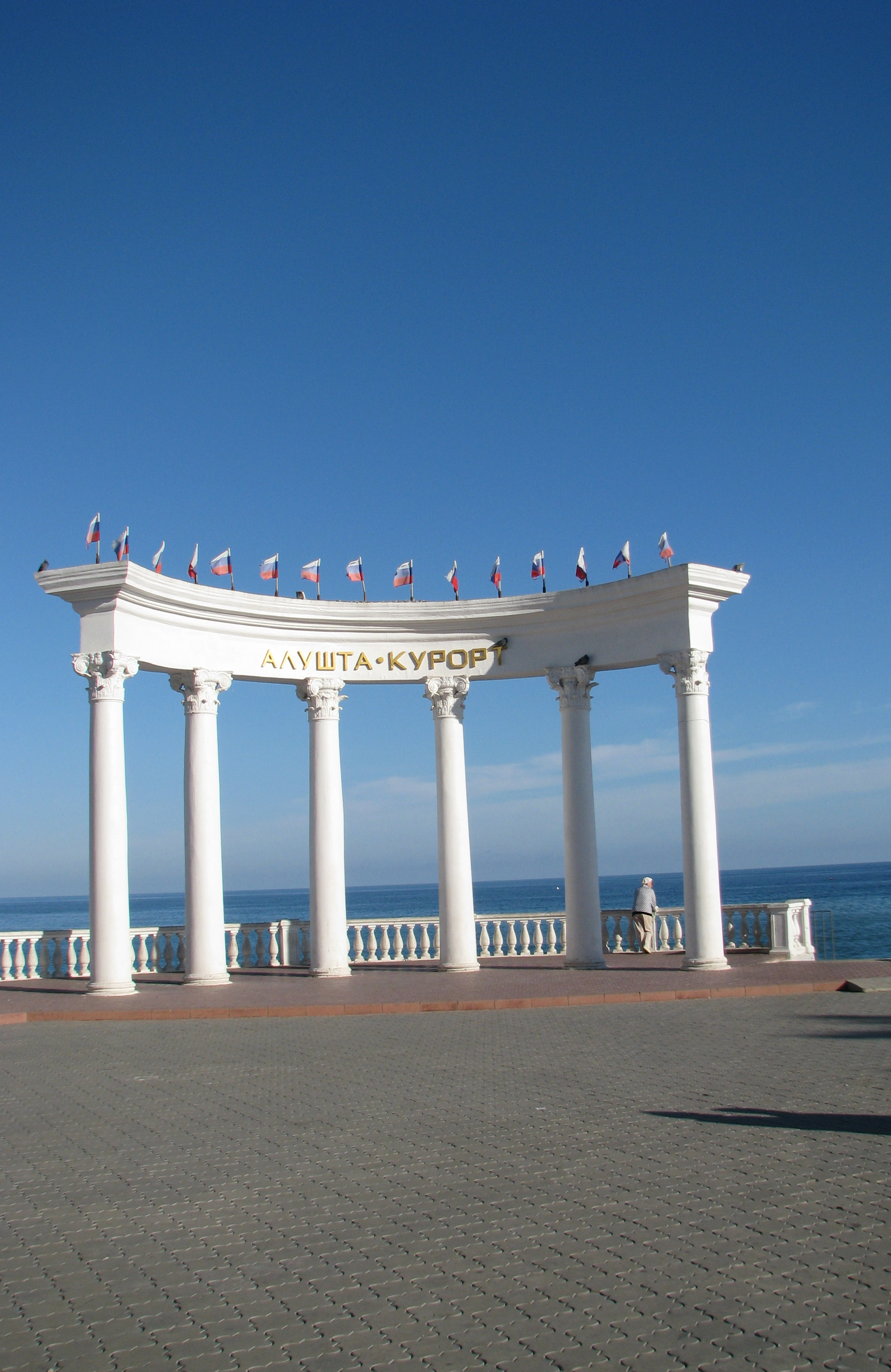 Ротонда, Алушта